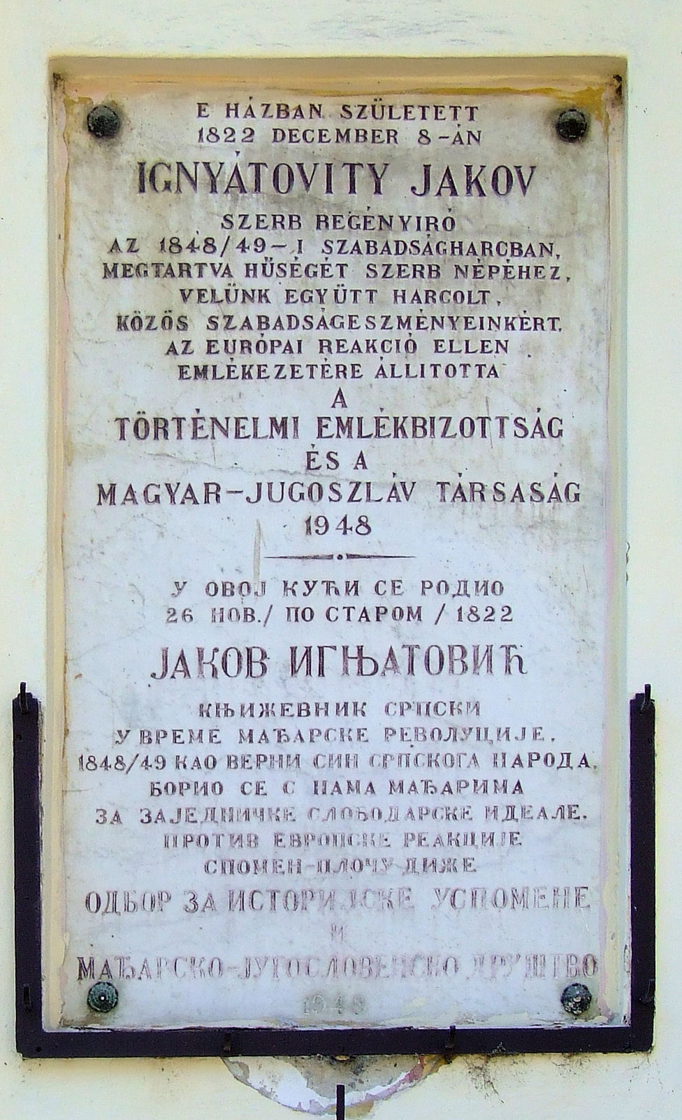 Emléktábla Jakov Ignjatović (1822–1889) magyarországi születésű szerb író, publicista, honvédtiszt, országgyűlési képviselő szentendrei szülőházán